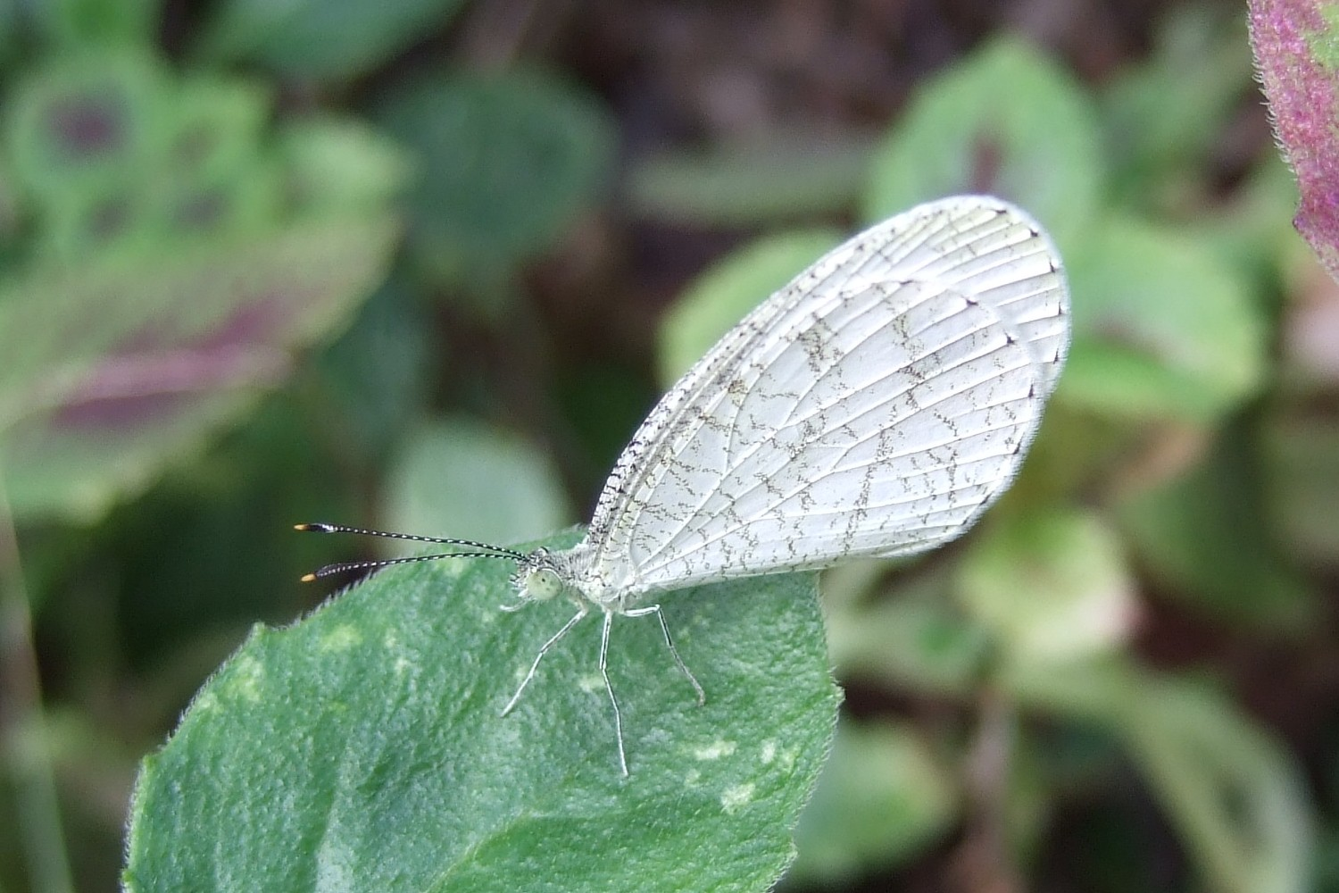 Leptosia nina - O͘-tiám-hún-tia̍p - 黑點粉蝶